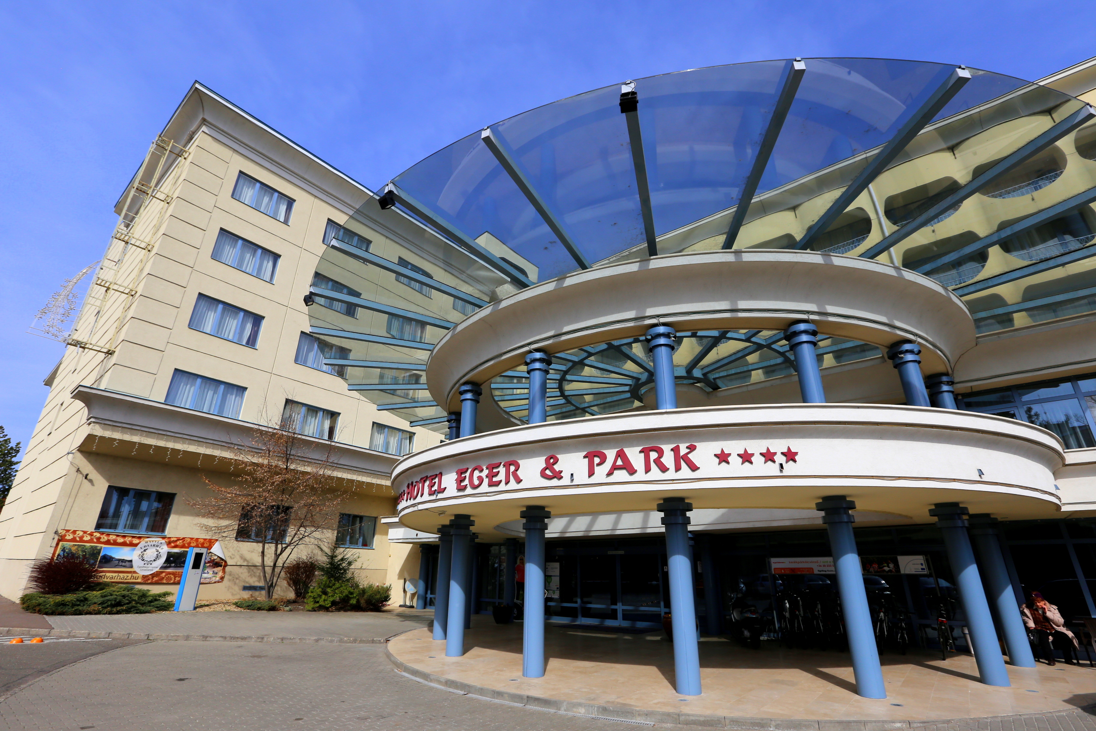 A Hotel Eger & Park**** 174 szobával...